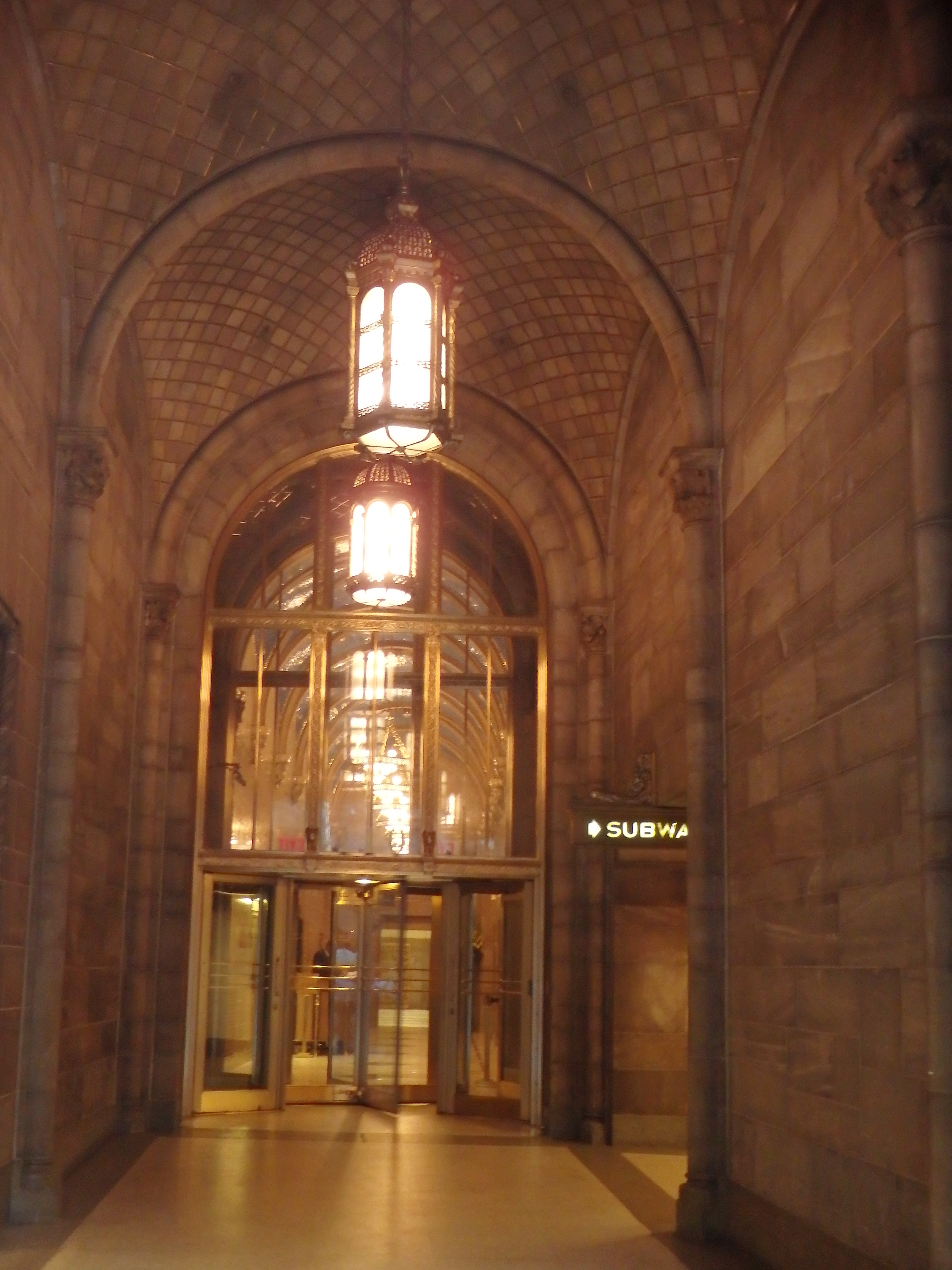 Midtown